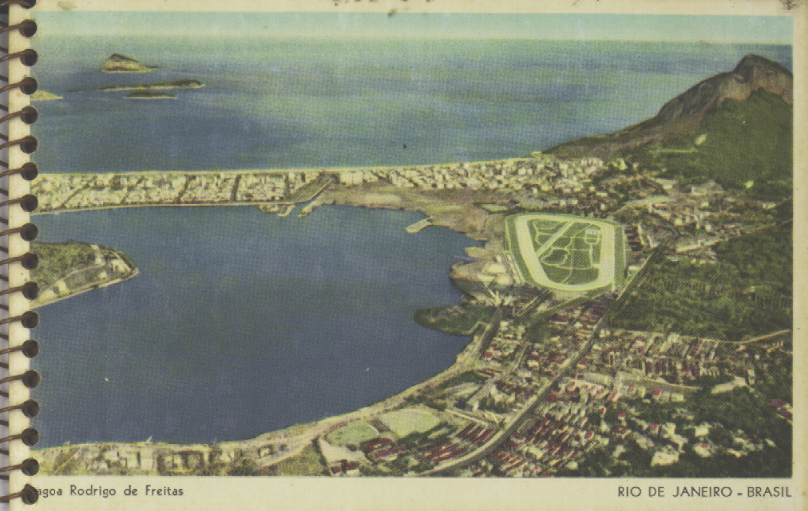 Obra que integra o acervo do Museu Paulista da USP. Coleção Werner Haberkorn